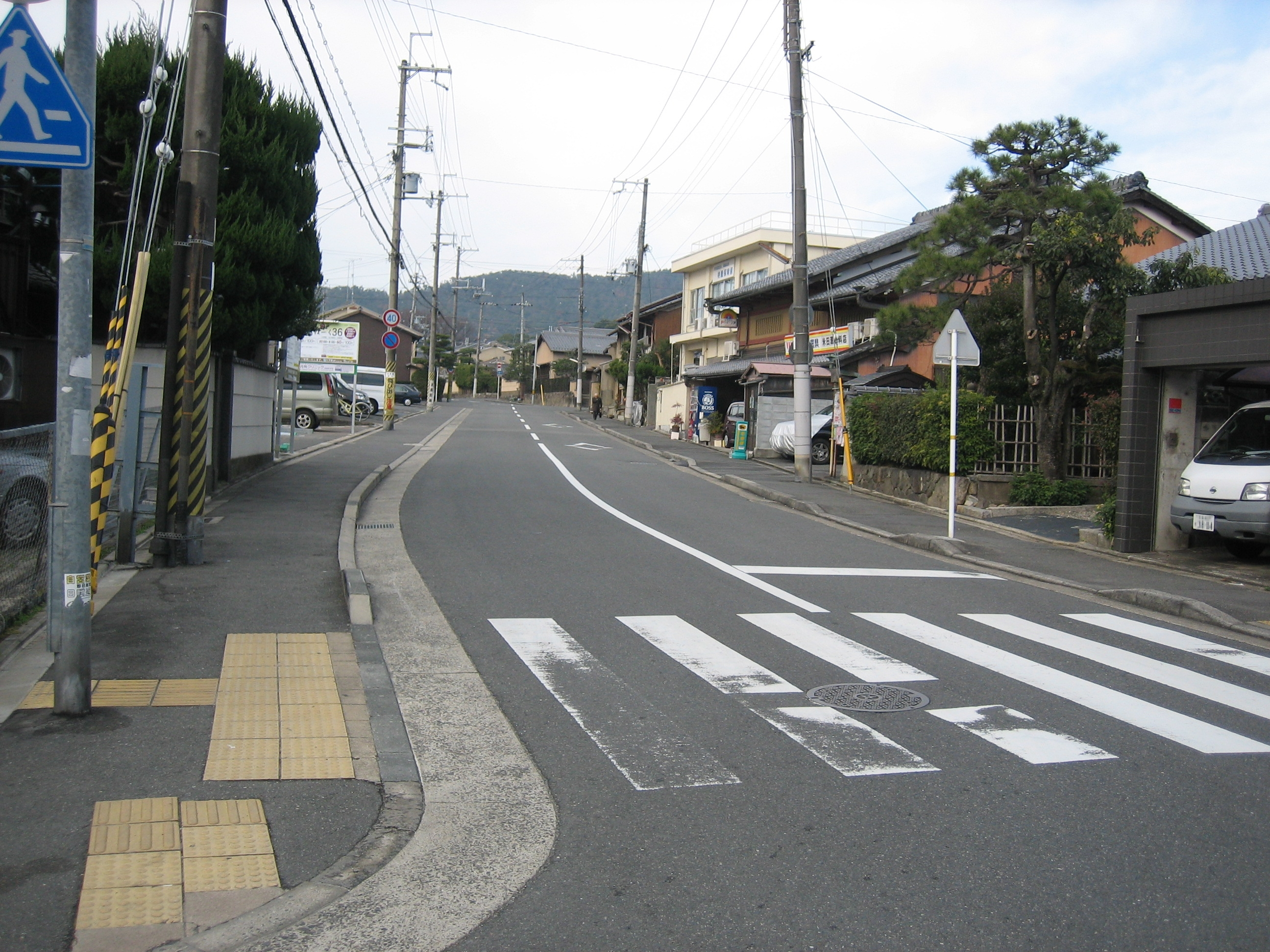 今宮通を京都市北区紫竹西南町で撮影